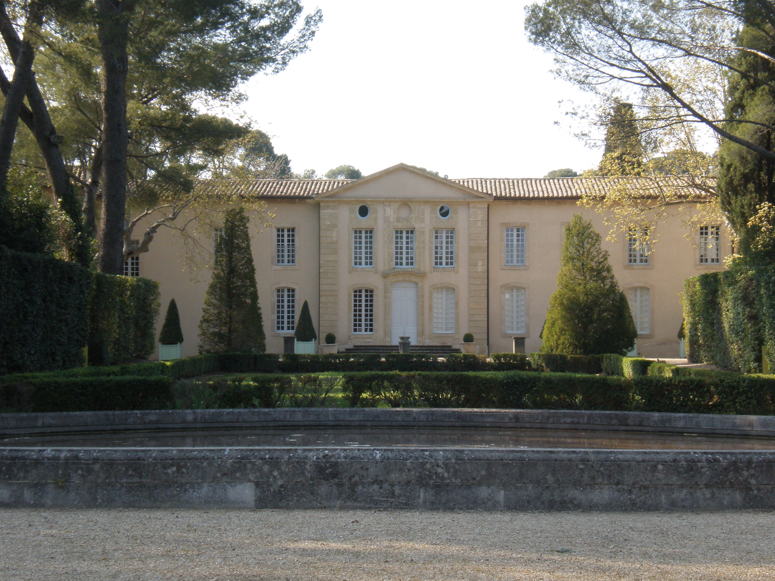 Le Château d'O à Montpellier (Hérault)